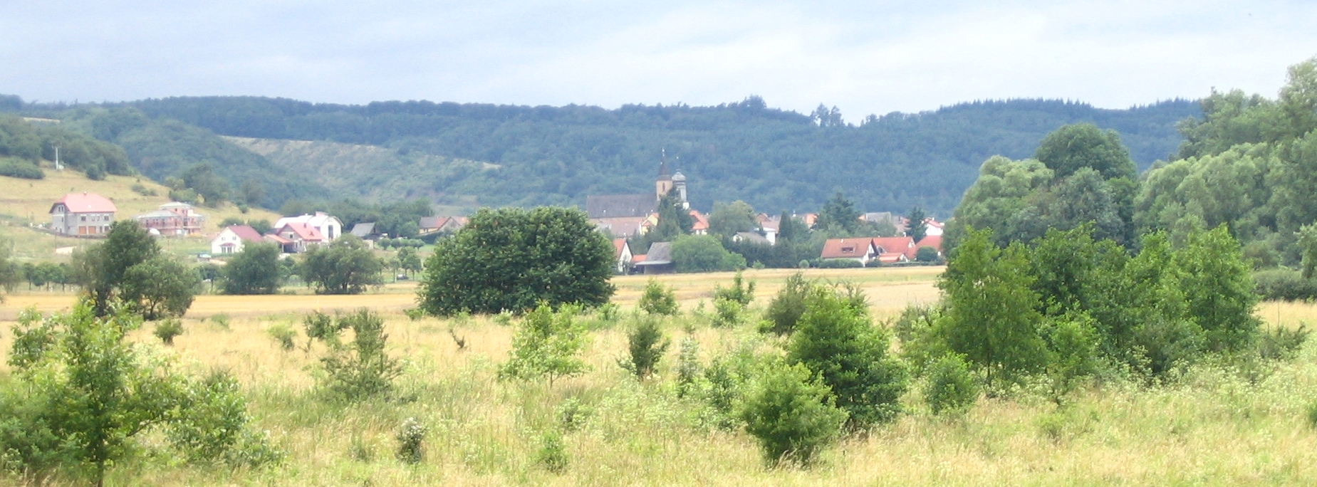 Merxheim im Naheland